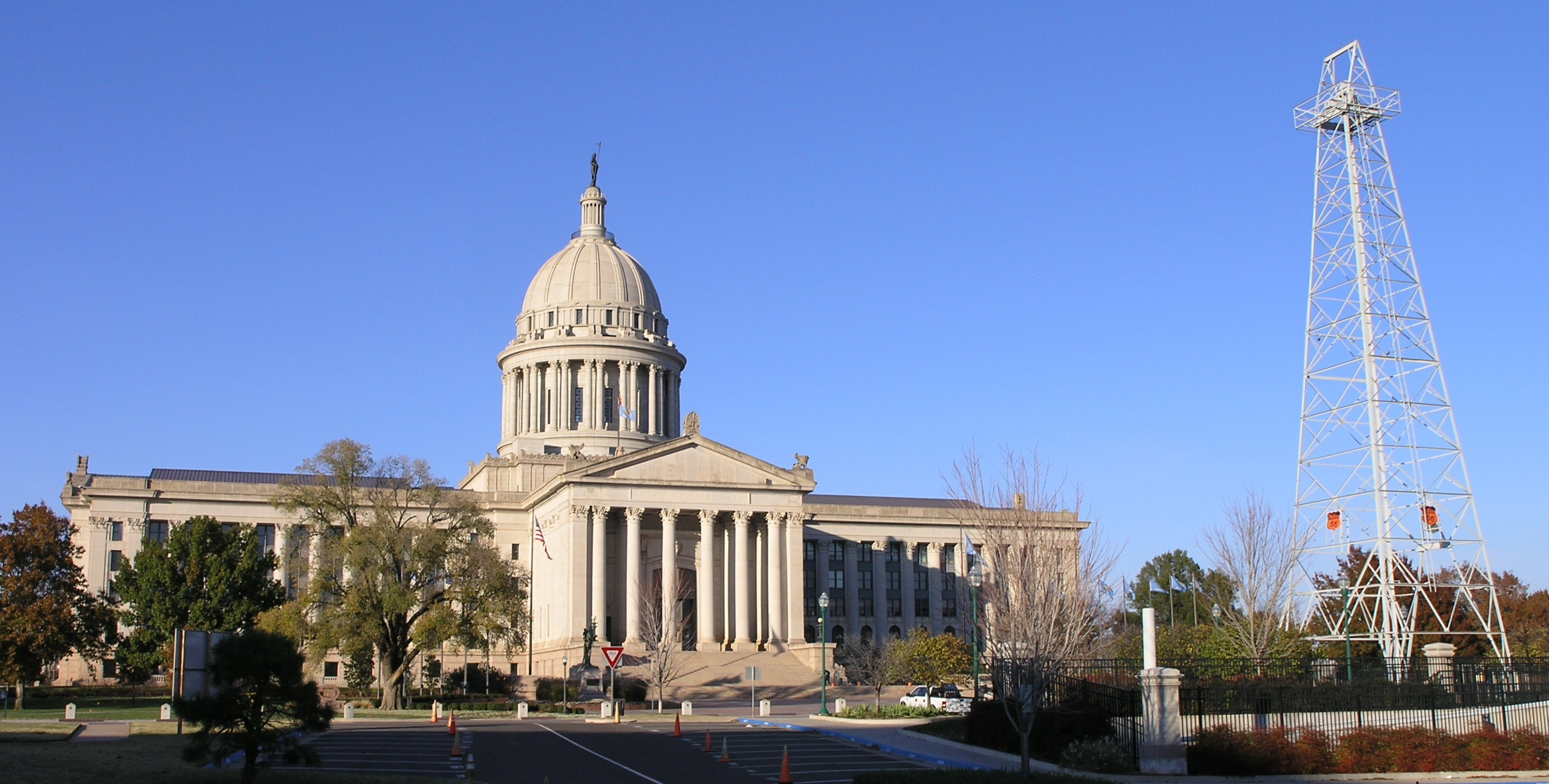 Oklahoma City